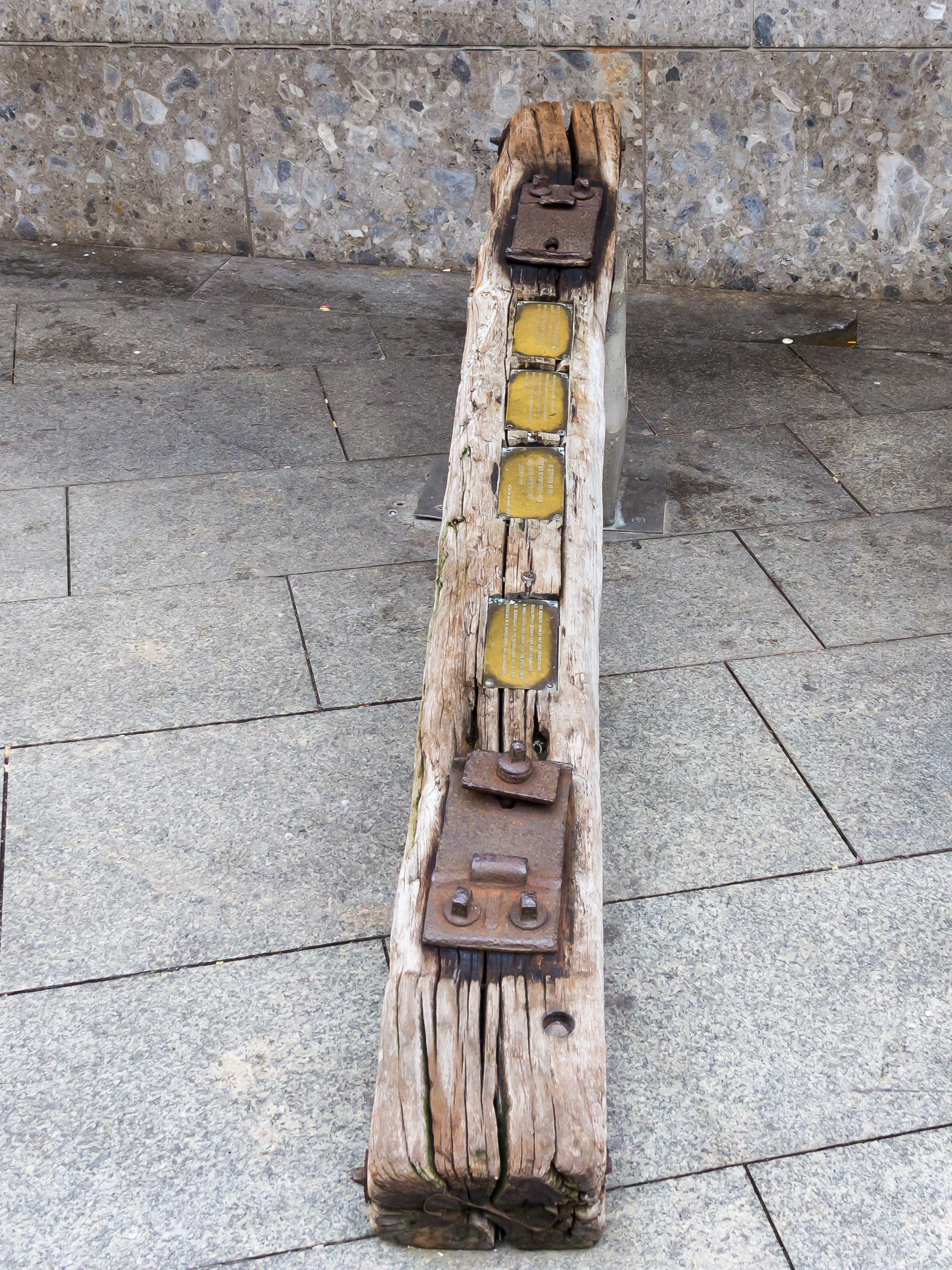 Schwelle der Erinnerung, Köln Hauptbahnhof. Gedenkschwelle, die von der privaten Initiative „Die Bahn erinnern“ aufgestellt wurde. Auf einer alten Bahnschwelle aus Eichenholz sind vier kleine Metalltafeln angebracht Text der Inschriften: "Viele Beamte, Angestellte und Arbeiter der Deutschen Reichsbahn waren in der Zeit des Nationalsozialismus an der Deportation von Millionen Menschen beteiligt. Nach genauen Zugfahrplänen wurden Frauen, Männer und Kinder aus allen Teilen Europas – meist in Güterwaggons gedrängt – in die Konzentrations- und Vernichtungslager abtransportiert. Im Gedenken an die Opfer von Deportation und nationalsozialistischer Vernichtung. Köln im Januar 2006 Die deutsche Bahn AG hat die Reichsbahn übernommen, weigert sich aber bis heute, in ihren Räumen und Bahnhöfen die Einbindung der Reichsbahn in die Verbrechen der Nazis öffentlich zu dokumentieren und zu bedauern."